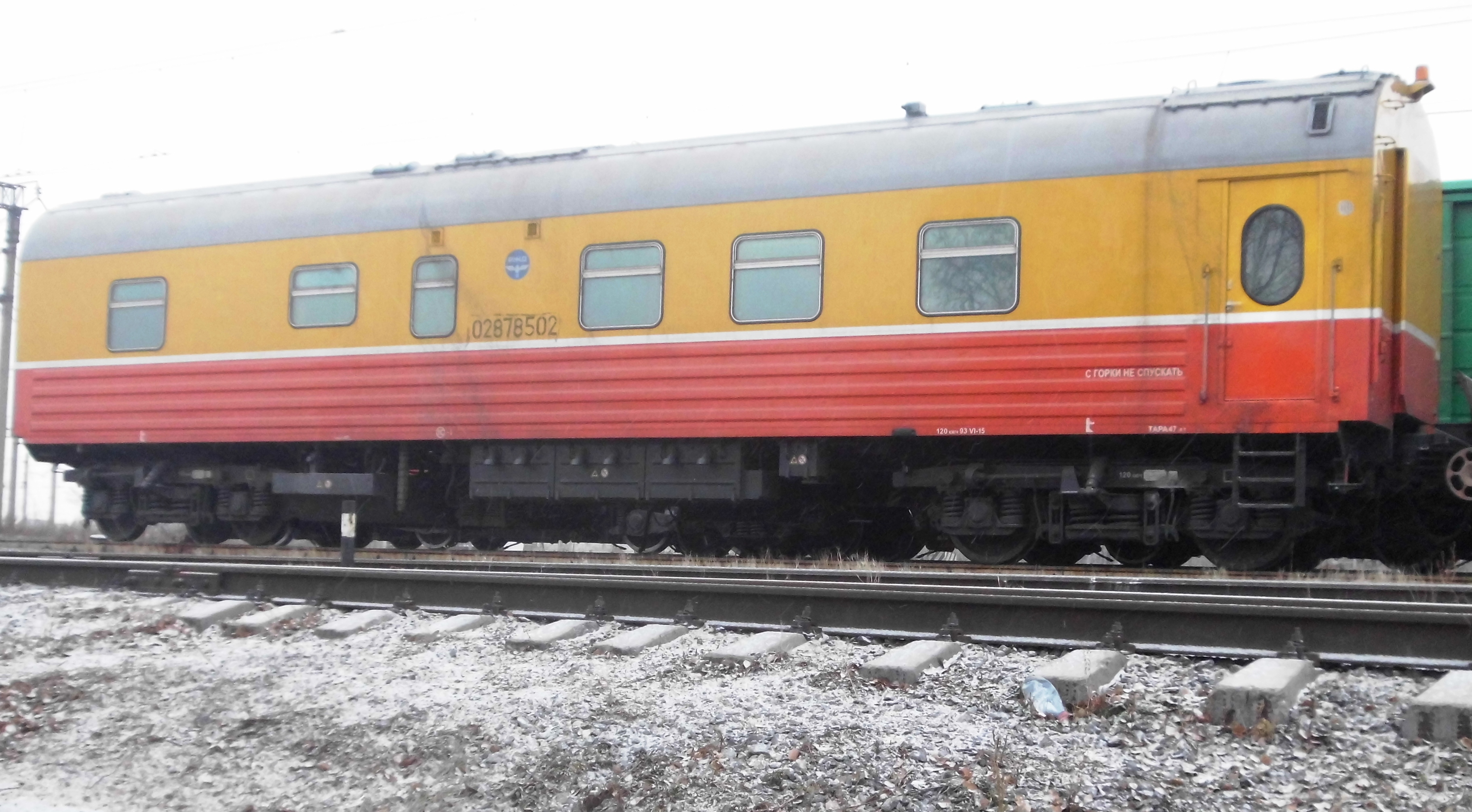 Вагон сопровождения модели 61-4484 в хвосте рельсовозного состава РС-800/3. Железнодорожная станция Металлургическая ЮУЖД. Тверской вагоностроительный завод.